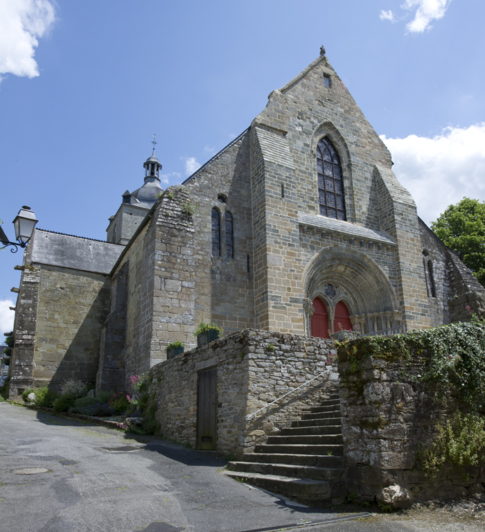 Façade Ouest